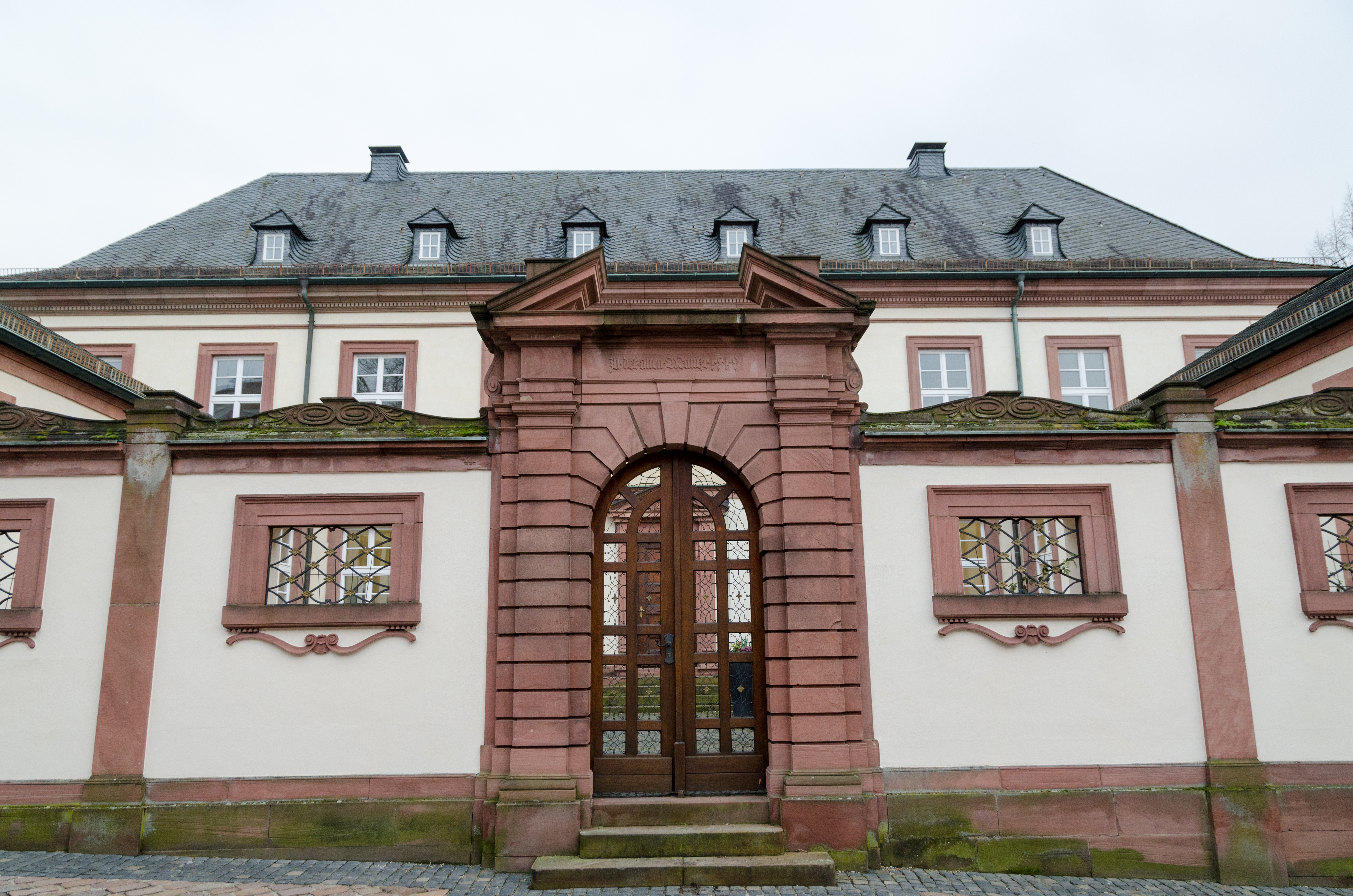 Aschaffenburg, Stiftsgasse 9